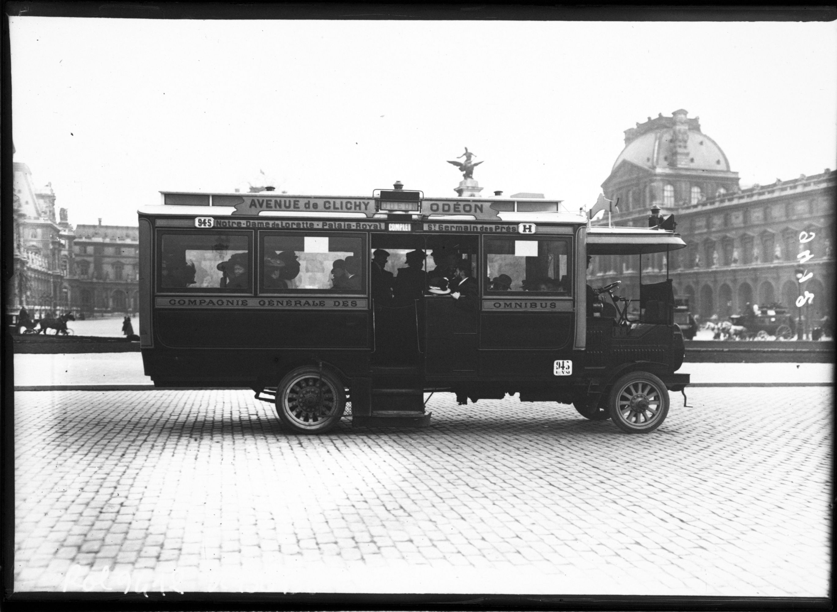 Autobus de la Compagnie générale des omnibus, ligne Avenue de Clichy - Odéon, sur la place du Carrousel à Paris en 1910.